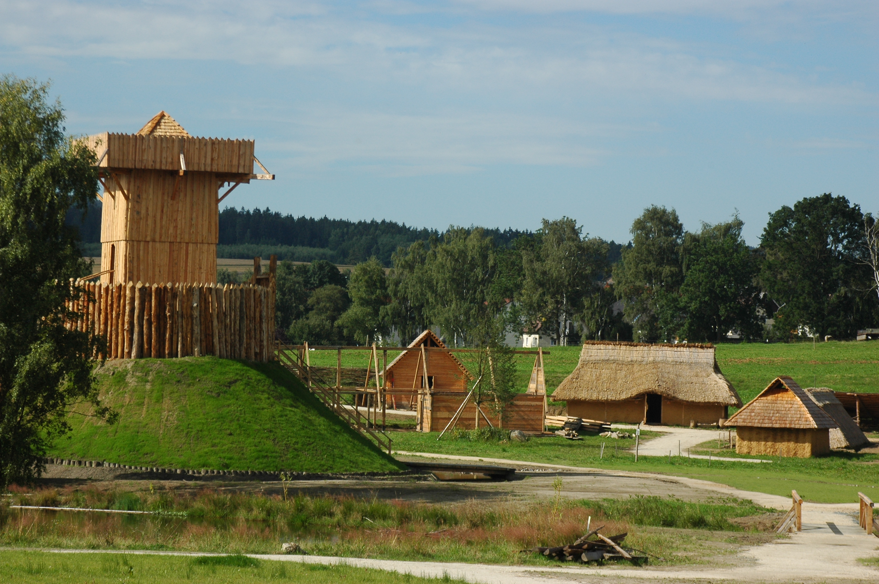 Die slawische Frühmittelaltersiedlung im Geschichtspark Bärnau-Tachov mit der Motte im Vordergrund